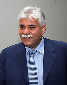 Nicodemo Oliverio